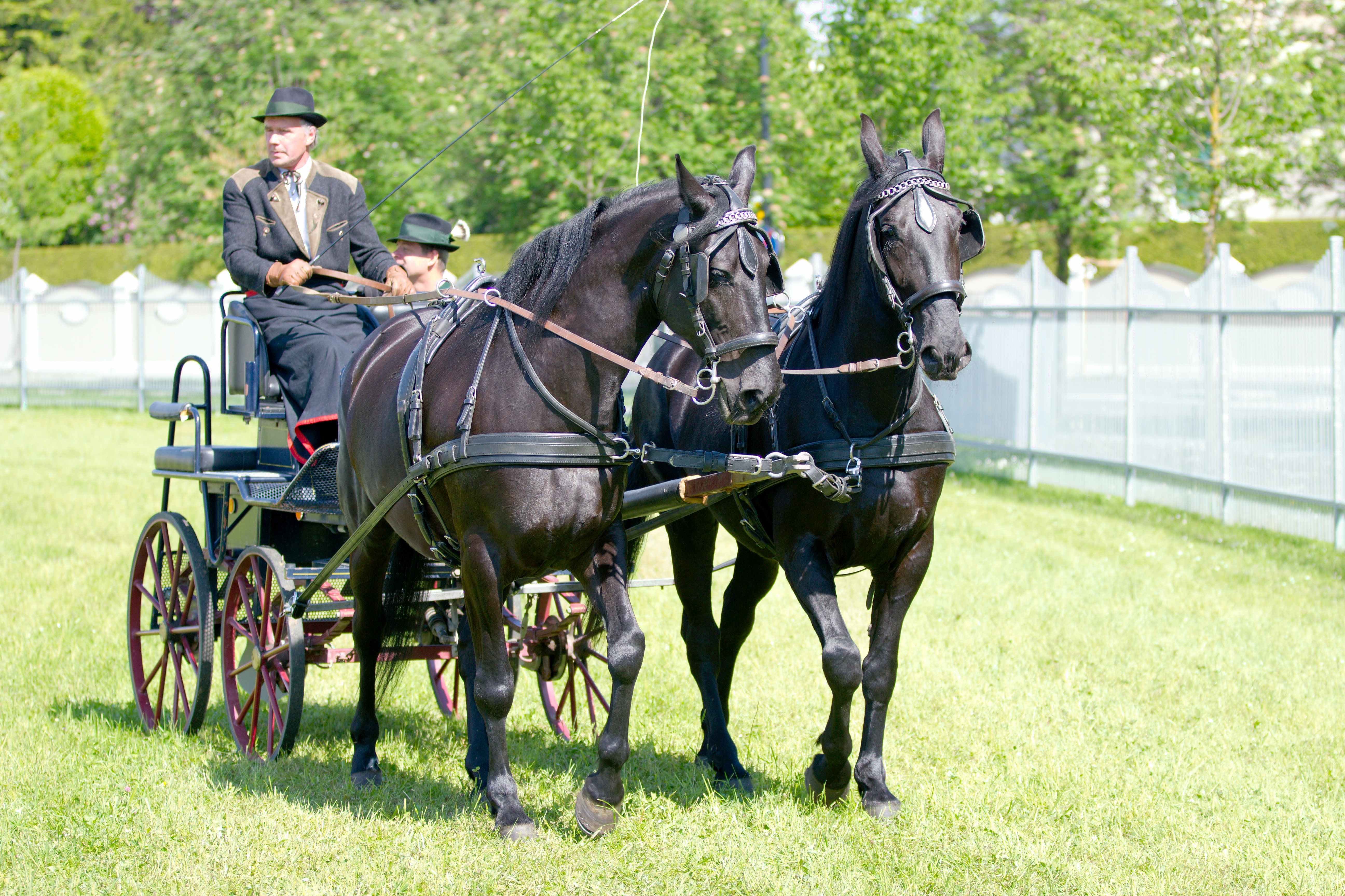 Horse driving at Stiegl brewery in Salzburg